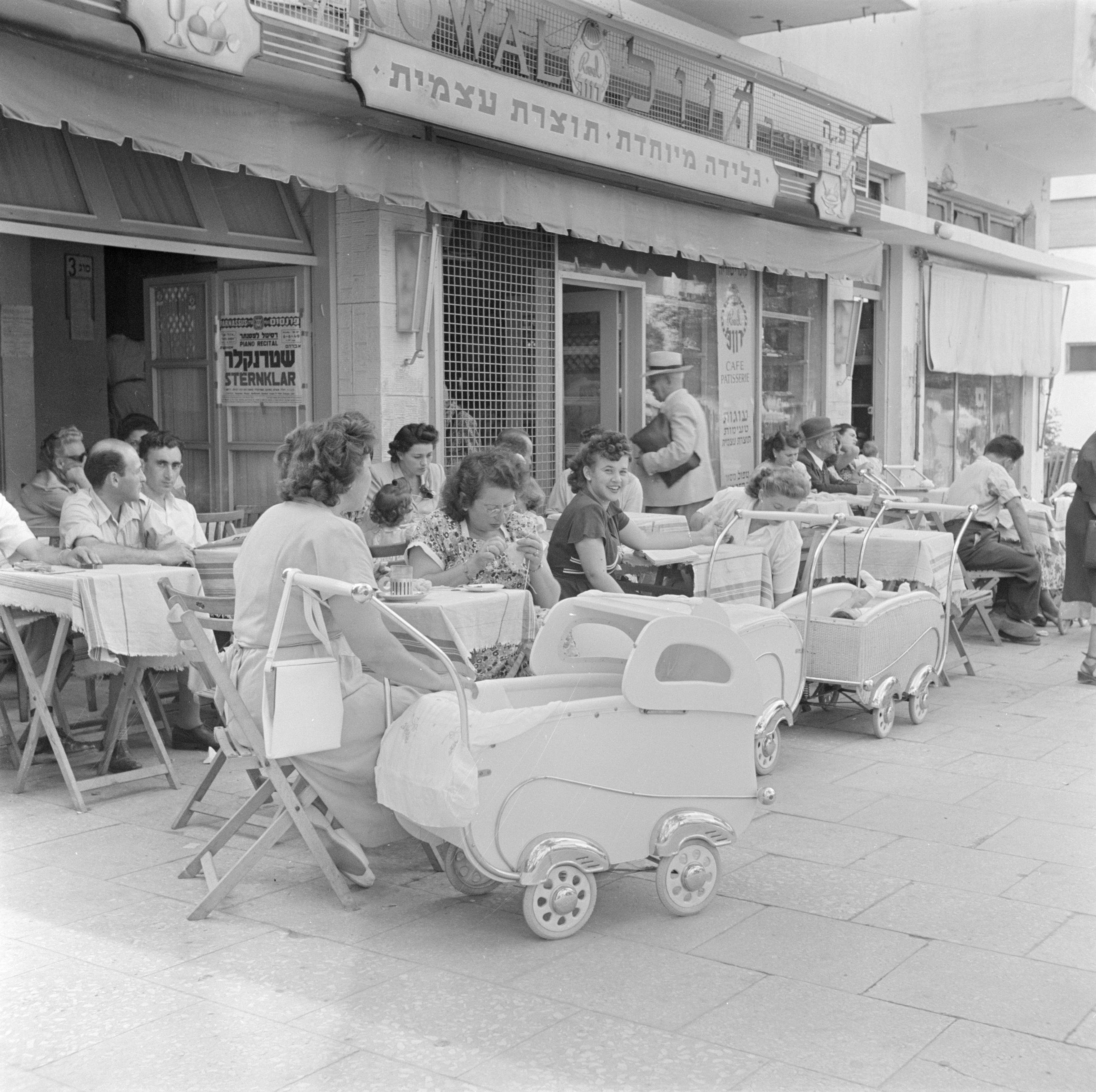 Collectie / Archief : Fotocollectie Van de Poll Reportage / Serie : Israel 1948-1949: Tel Aviv Beschrijving : Terras van cafe-patisserie Royal aan de Dizengoff Road in Tel Aviv met moeders, kinderen en kinderwagens Datum : 1948 Locatie : Israël, Tel Aviv Trefwoorden : bakkers, cafés, horeca, kinderen, kinderwagens, reclame, straatbeelden, terrassen Fotograaf : Poll, Willem van de Auteursrechthebbende : Nationaal Archief Materiaalsoort : Negatief (zwart/wit) Nummer archiefinventaris : bekijk toegang 2.24.14.02 Bestanddeelnummer : 255-1295